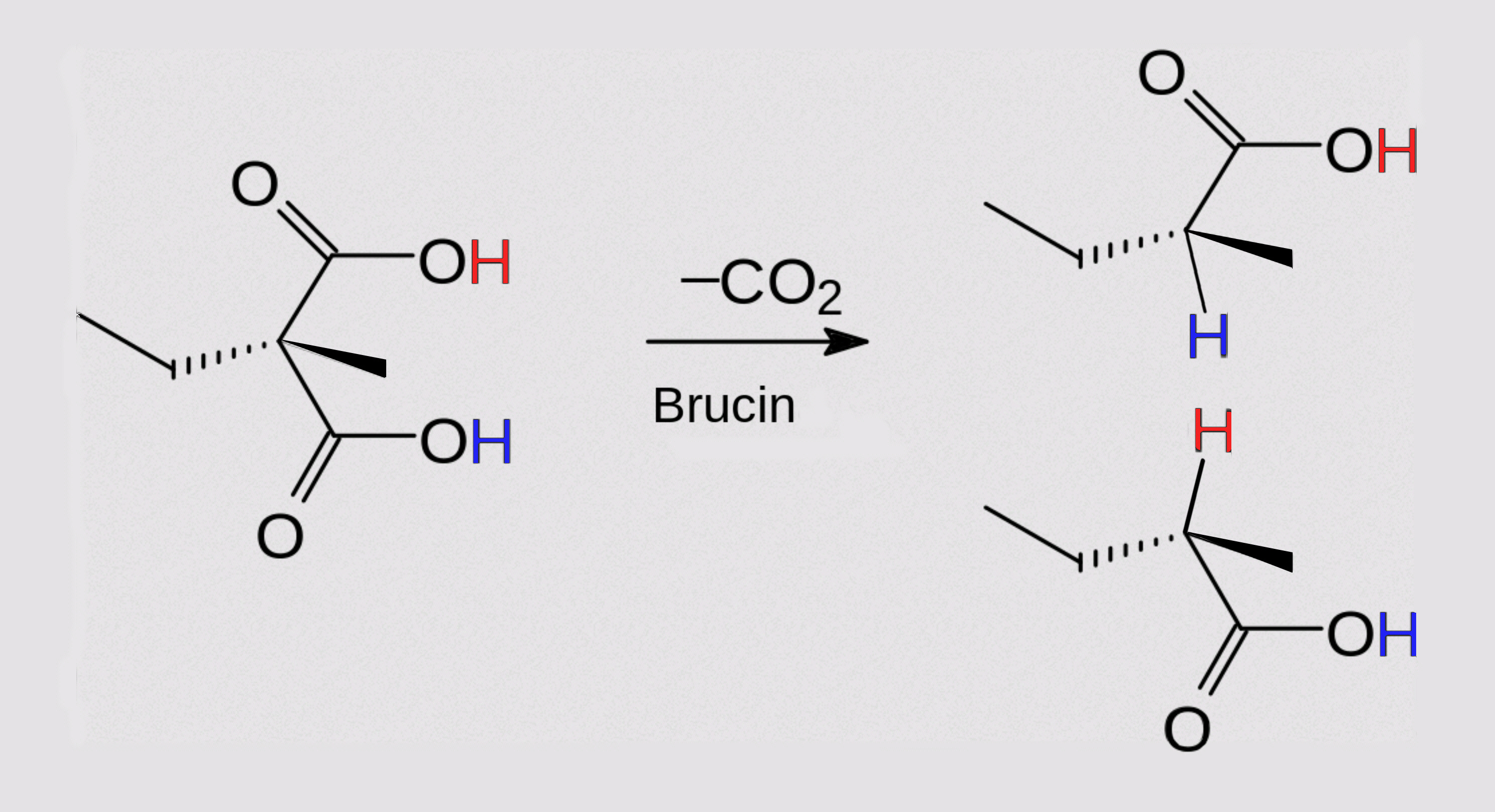 Asymmetrische Katalyse bei Ethyl-methylmalonsäure (1904 entdeckt von Willy Marckwald)